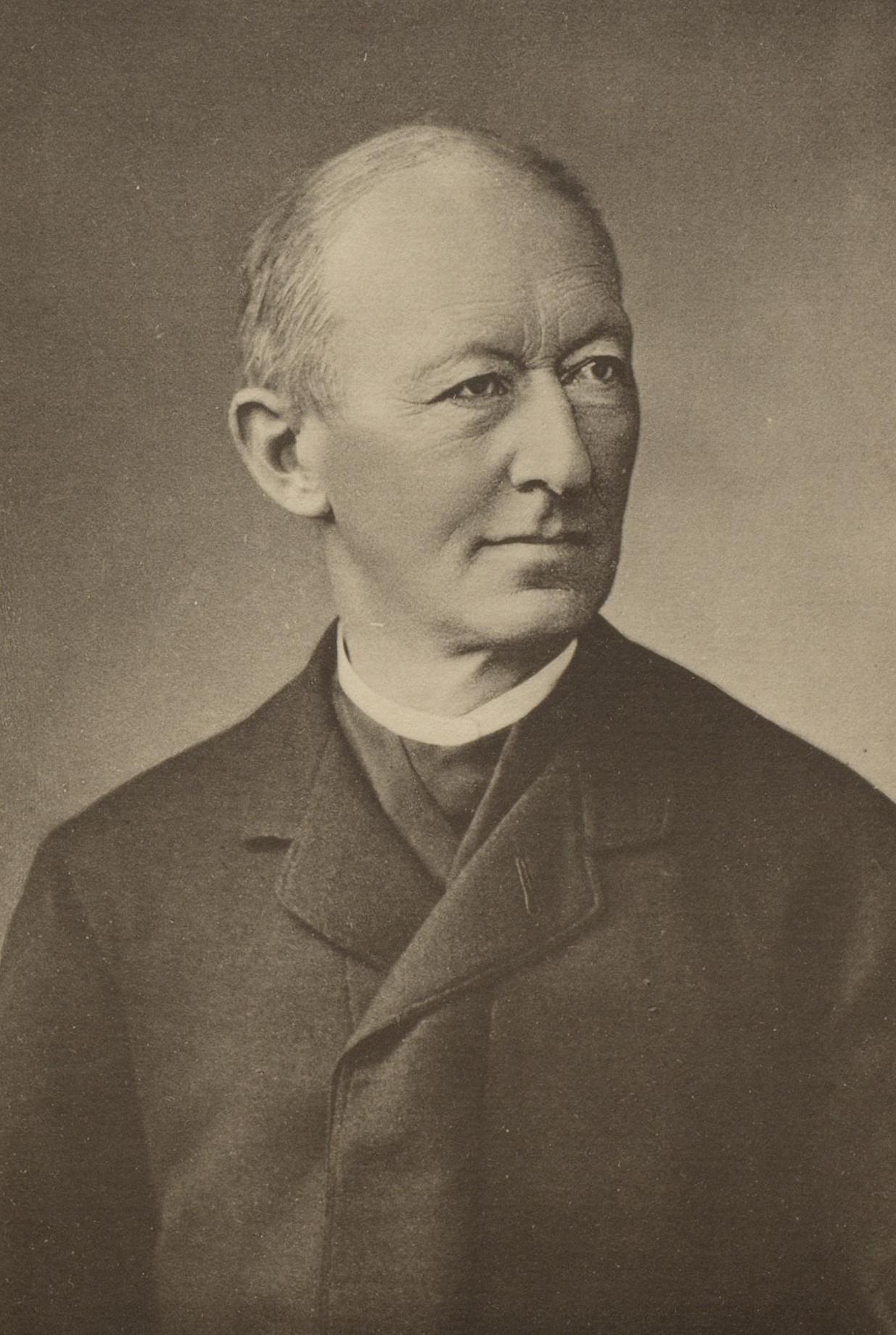 Foto von Oskar von Wächter